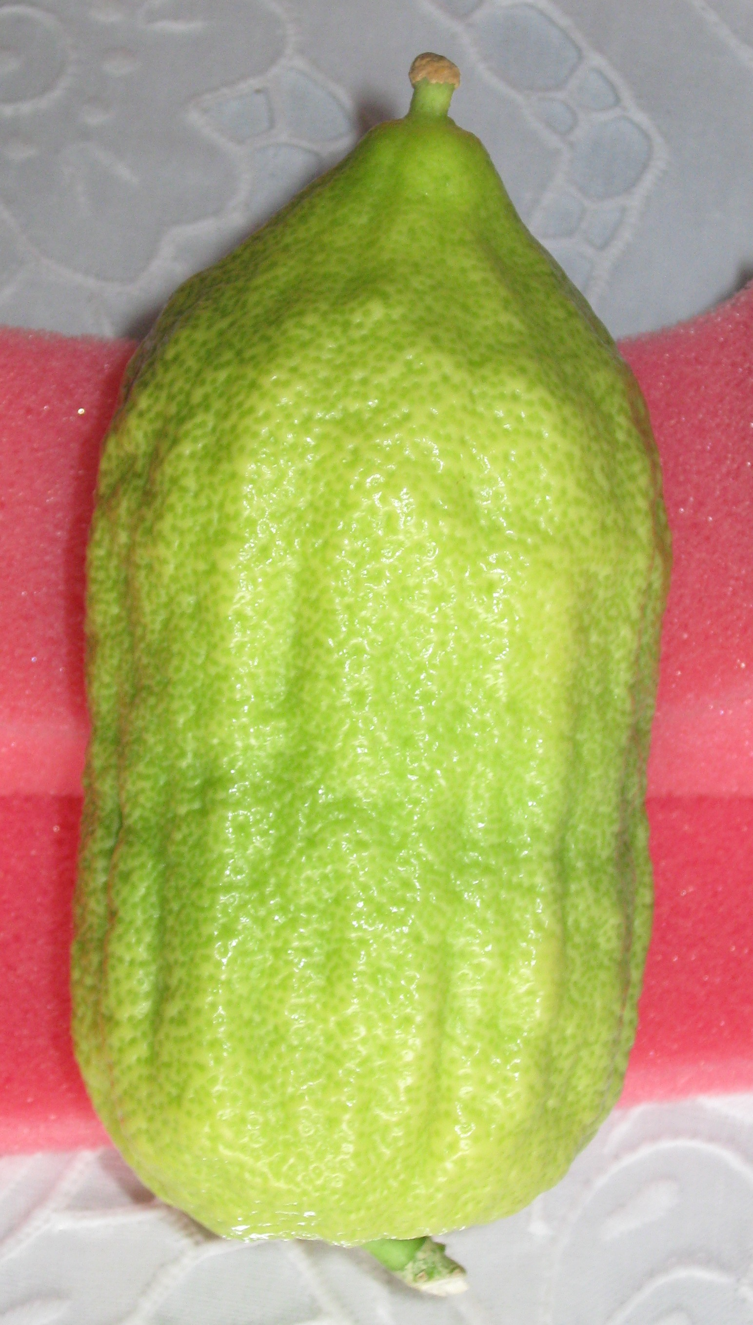 Morocccan Etrog